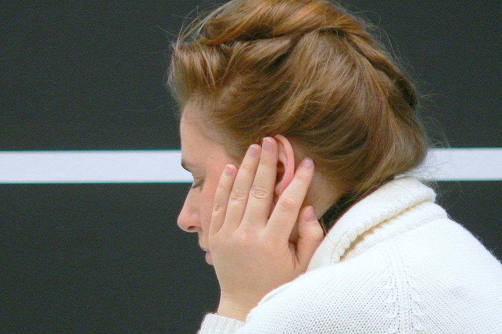 GM Judit Polgar (Hungary), Wijk aan Zee 2005